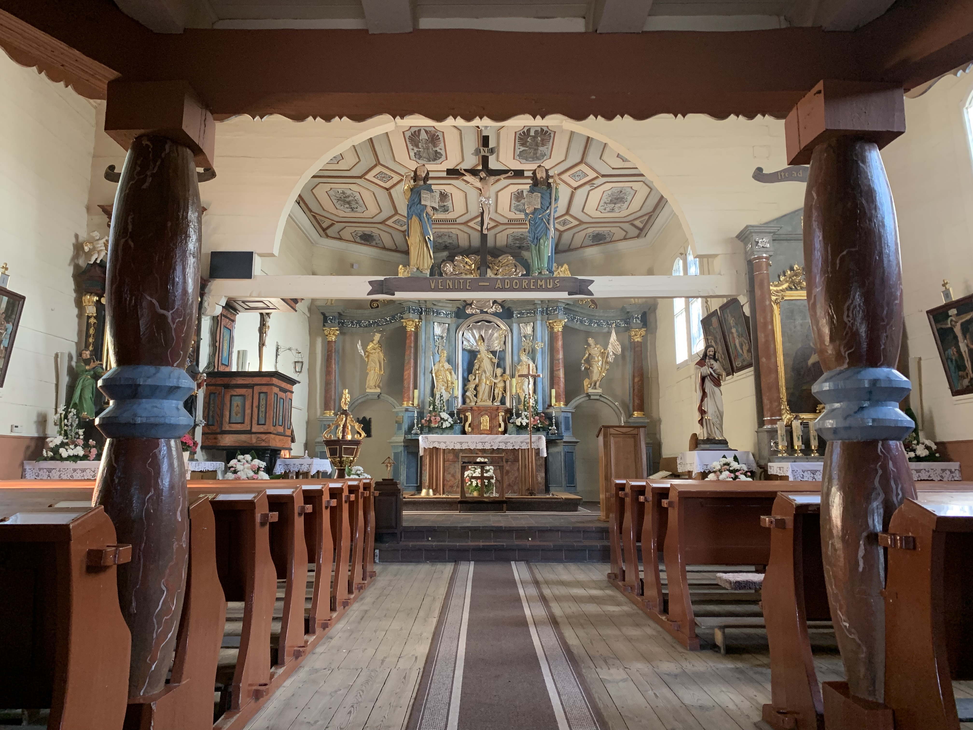 Ogólny widok wnętrza kościoła św. Marcinach w Ochodzach